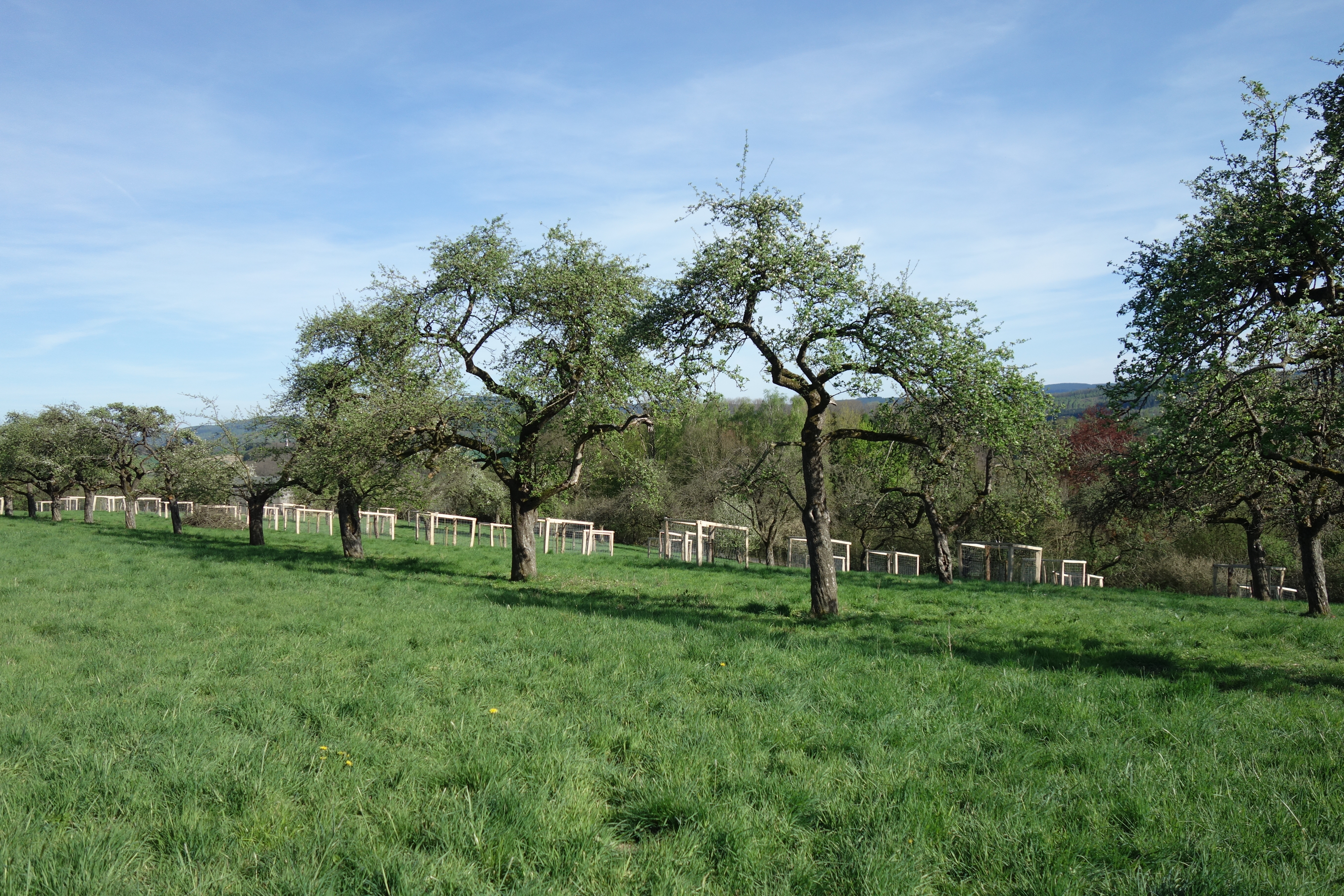 Geschützter Landschaftsbestandteil Apfelhof Am Franziskus von Westen aus gesehen.